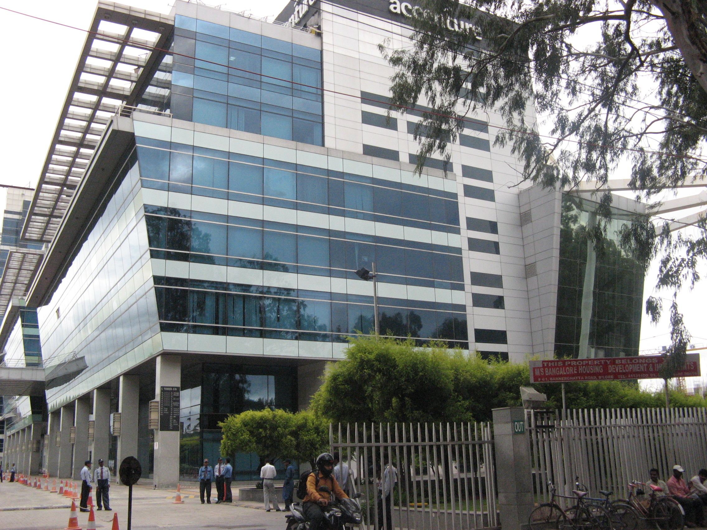 ബാംഗളൂർ ബെന്നാർഗട്ട റോഡിലെ അക്സെഞ്ചർ ഓഫീസ്